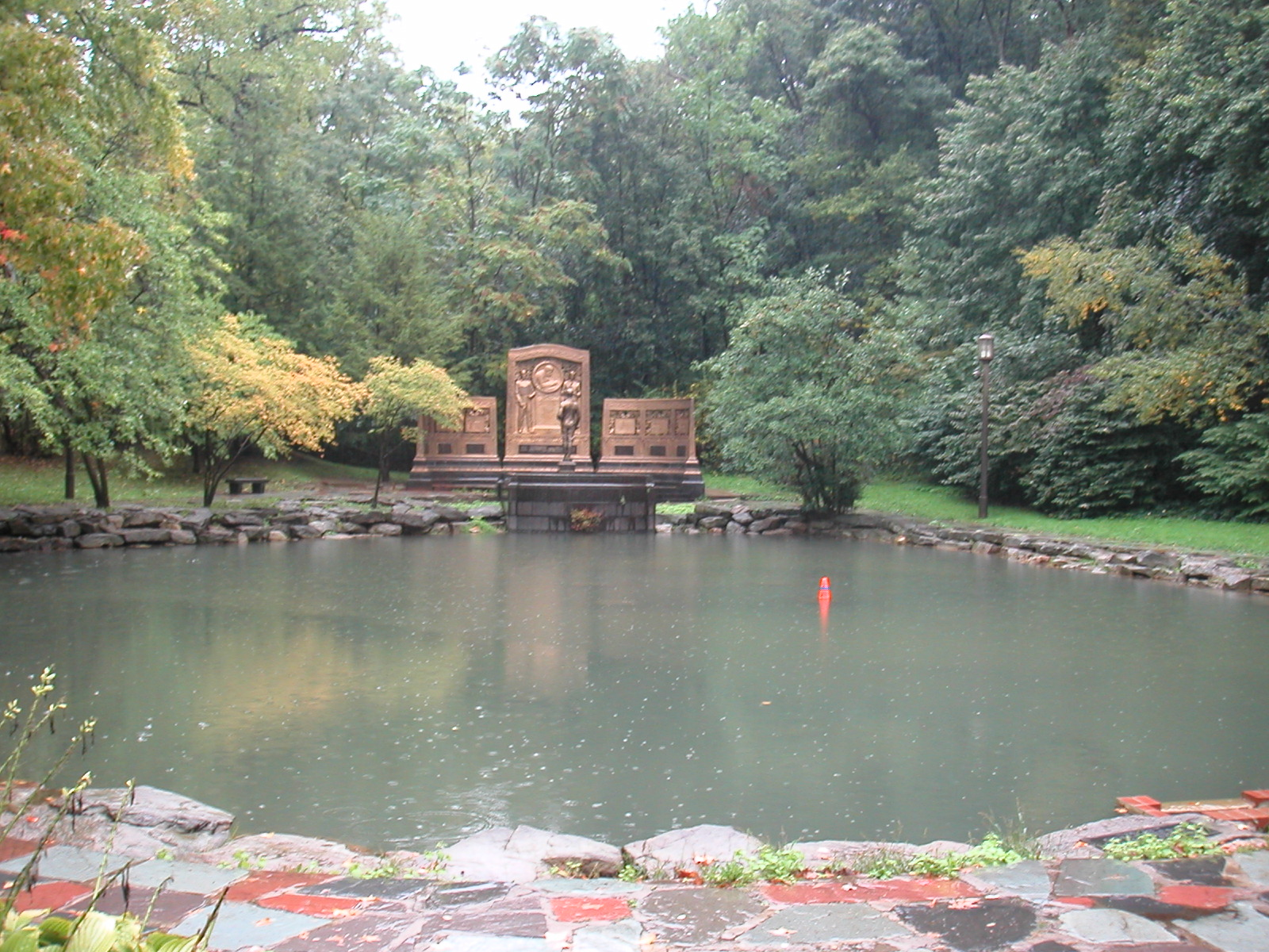 Pittsburgh